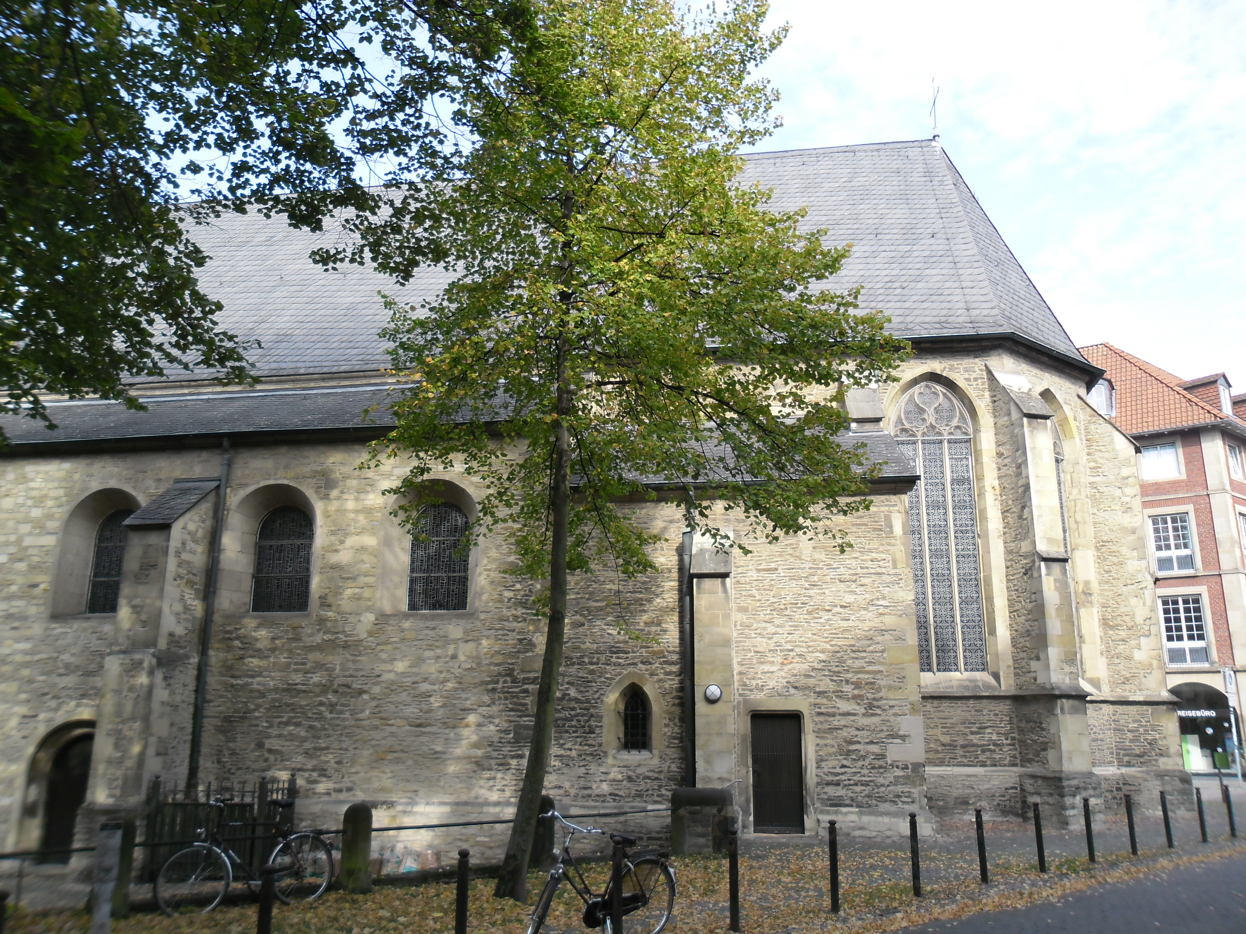 Die Servatiikirche an der Einmündung des Servatiikirchplatzes in die Klosterstraße am Ostrand der Münsteraner Altstadt